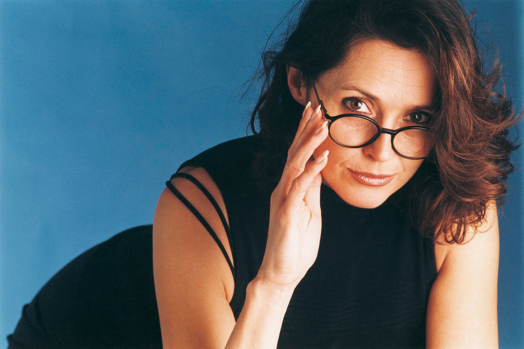 Zangeres en tv-figuur Wendy Van Wanten